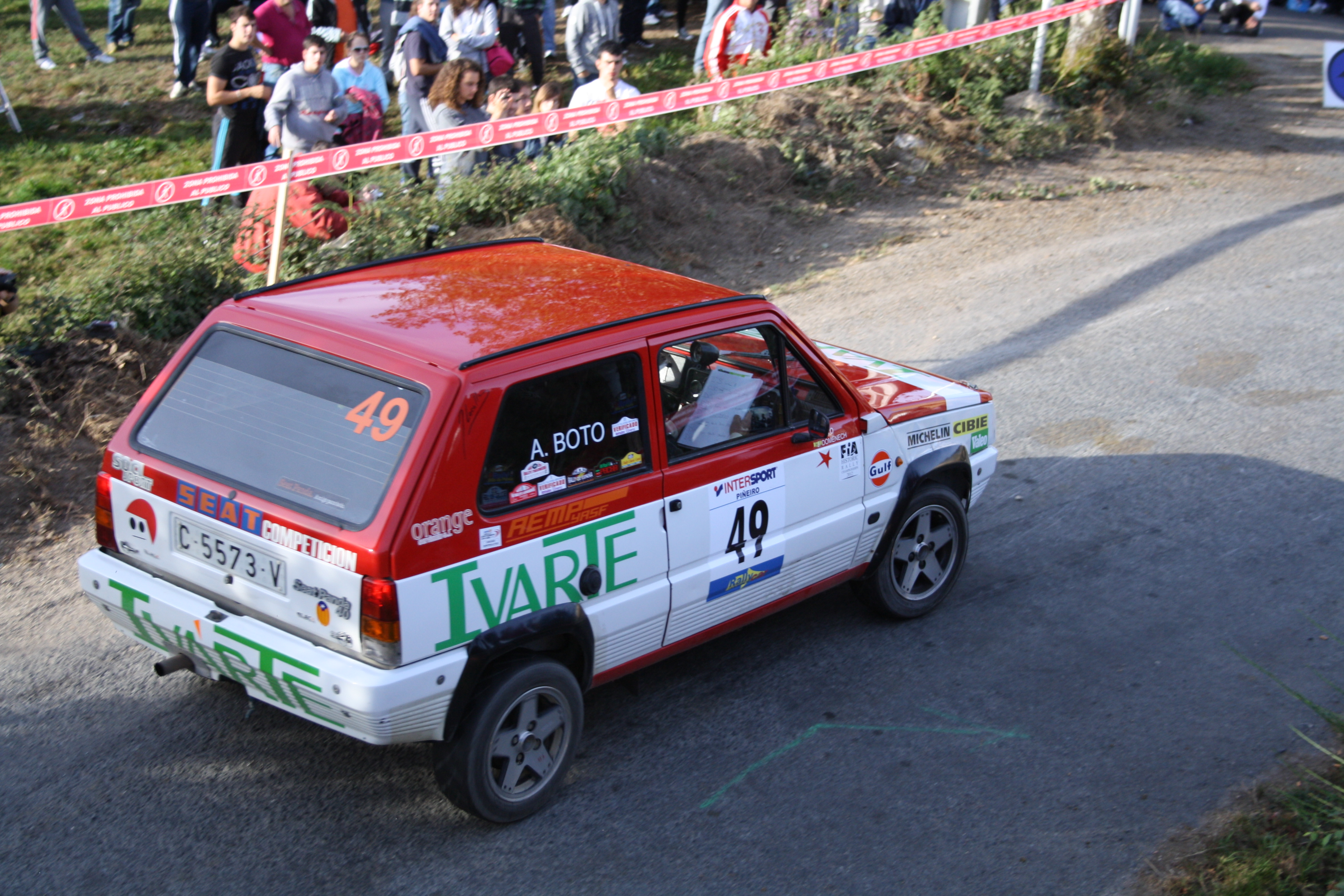 Seat Panda. Pilotado por Domenech y Boto.